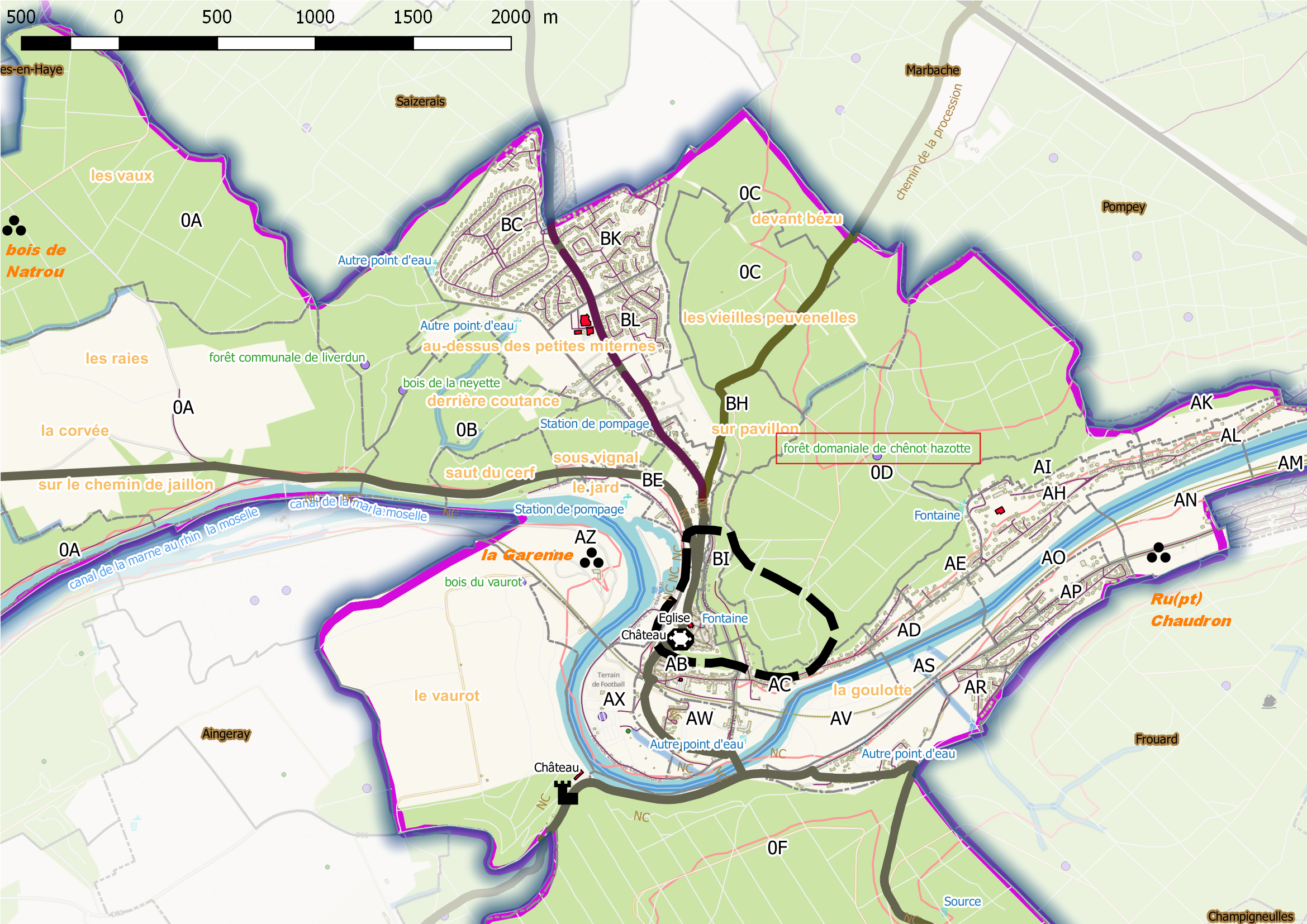 Liverdun (ban communal) - Osm et Qgis - mentions manuscrites